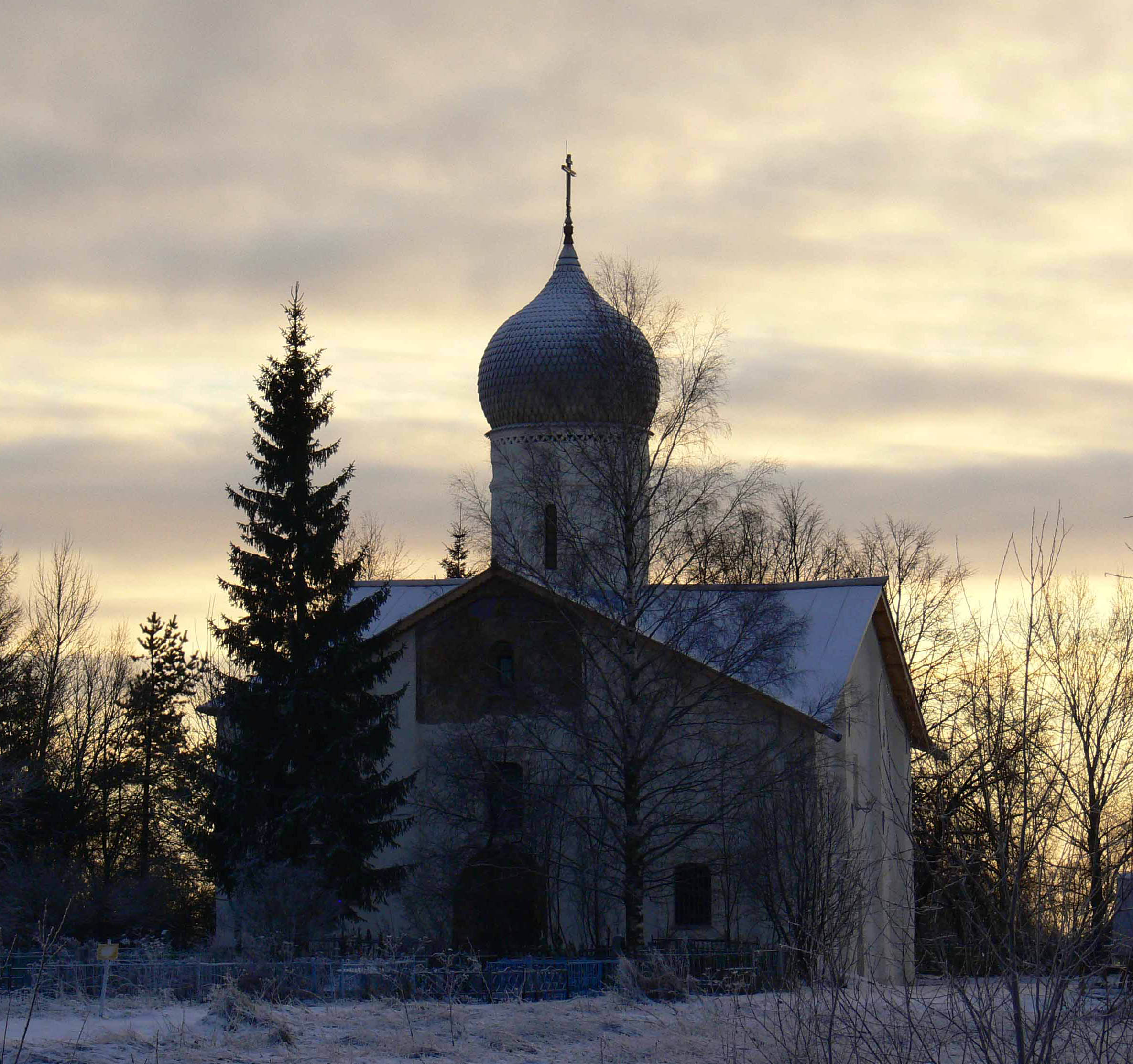 Церковь Благовещения Благовещенского Мячинского монастыря в Аркажах. Великий Новгород